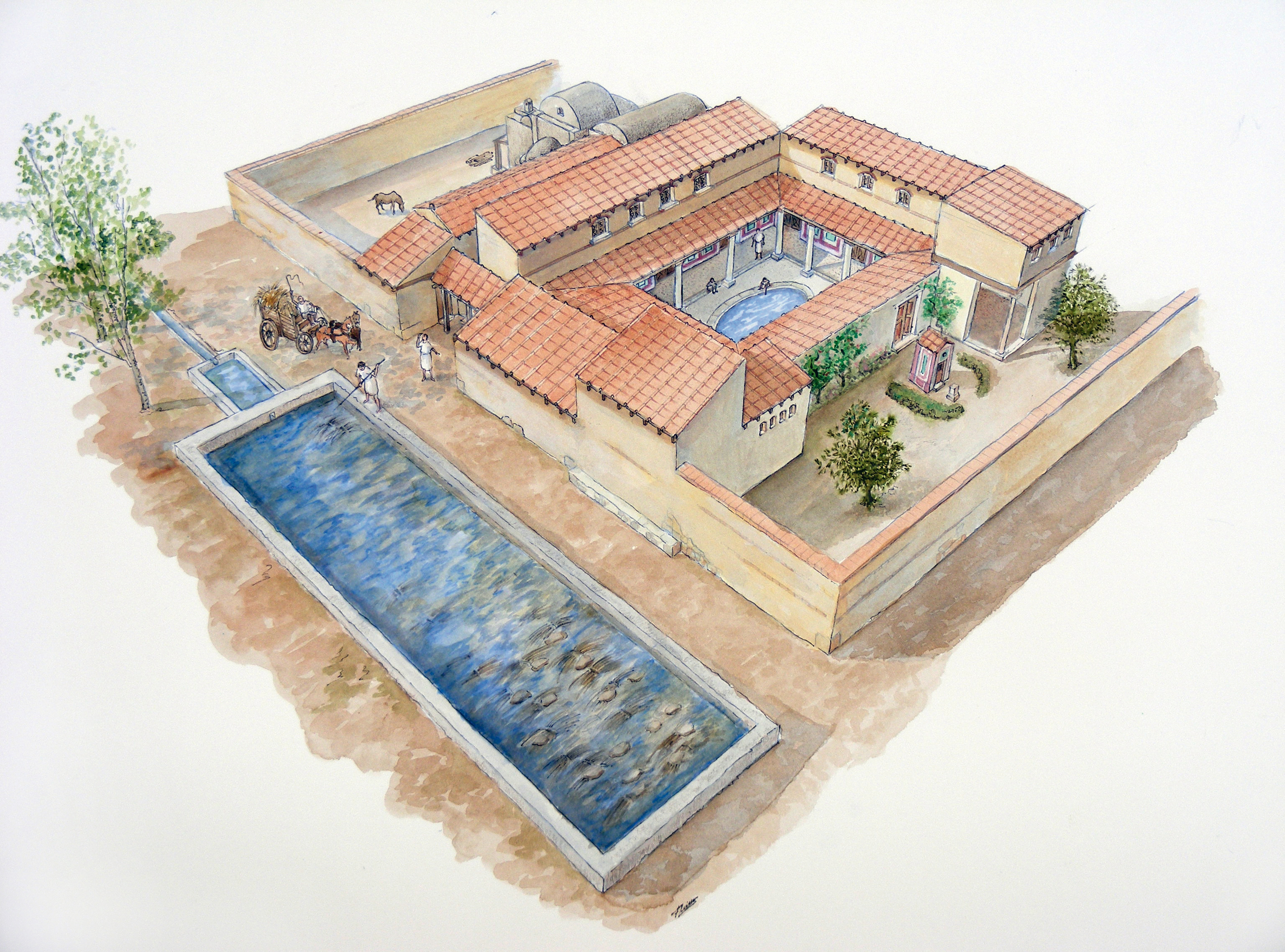 Recreació de la vila de Cornelius de l'Ènova (F. Chiner)